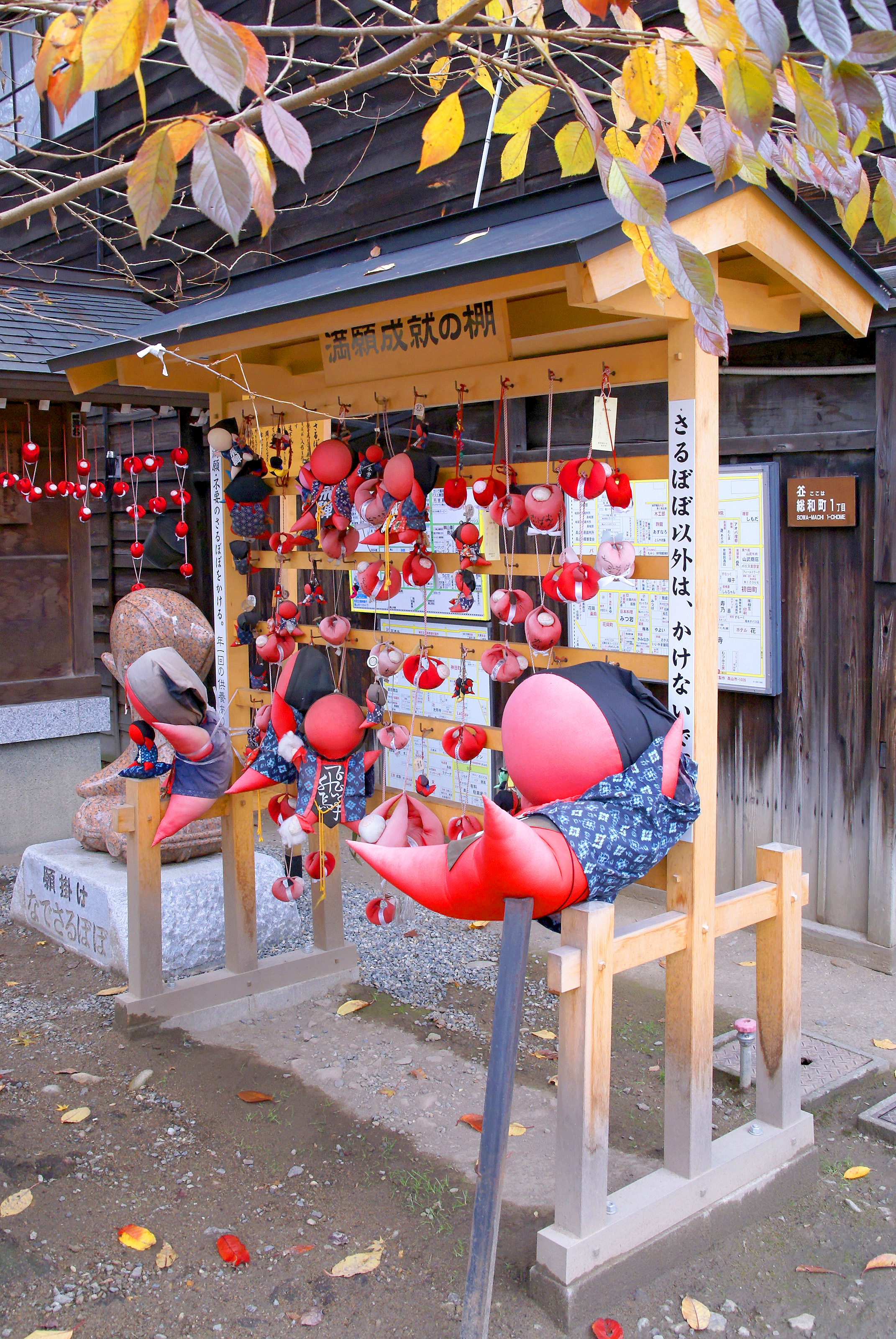 Hida-kokubunji in Takayama, Gifu prefecture, Japan